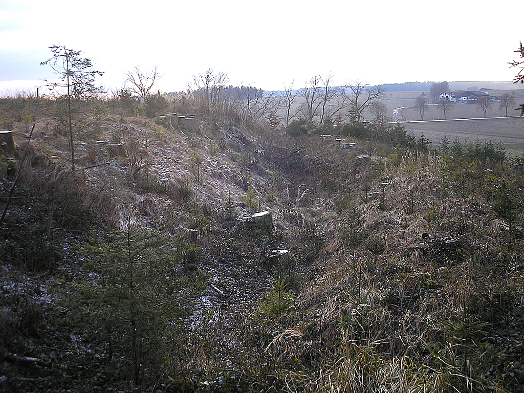 Frühmittelalterlicher Ringwall bei Mittelstetten (Landkreis Fürstenfeldbruck, Oberbayern). Das nordwestliche Wallsystem. Blick nach Südwesten. Eigene Aufnahme, Dez. 2007 / Early Middle Ages ringwork castle near Mittelstetten (Landkreis Fuerstenfeldbruck, Upper Bavaria, Germany). The north western fortifications, looking south west. Own photo, Dec. 2007